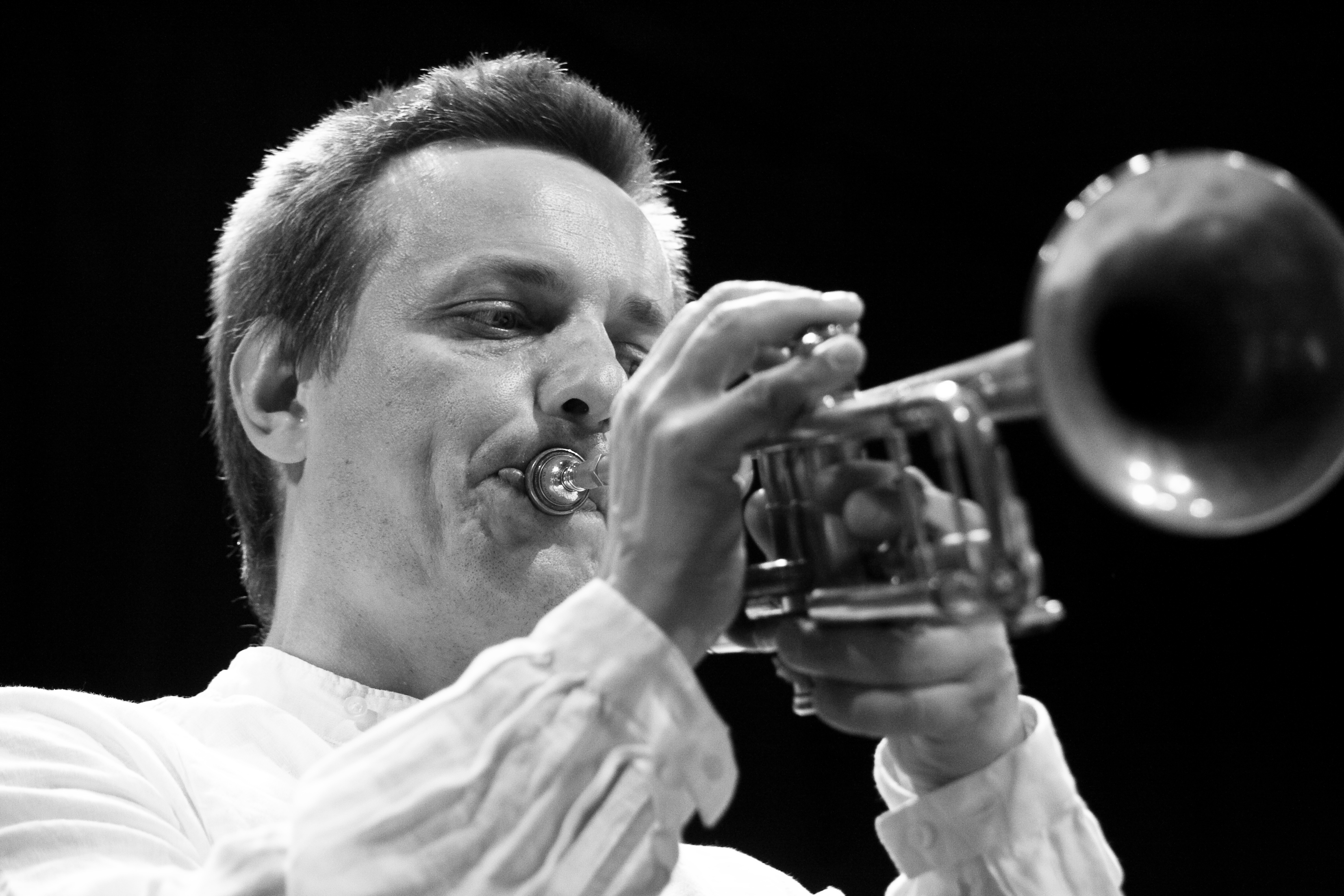 Le trompettiste Laurent Blondiau avec le groupe print de Sylvain Cathala en mai 2008 au studio de l'ermitage